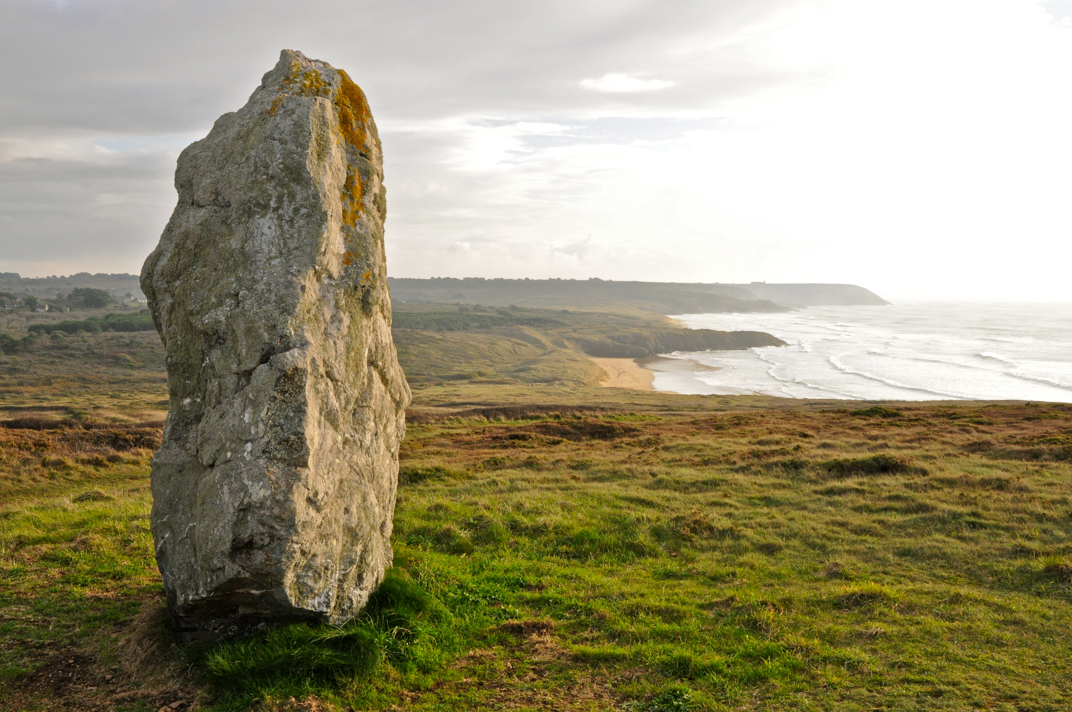 Menhir sur la pointe de Lost Marc'h en presqu'île de CROZON